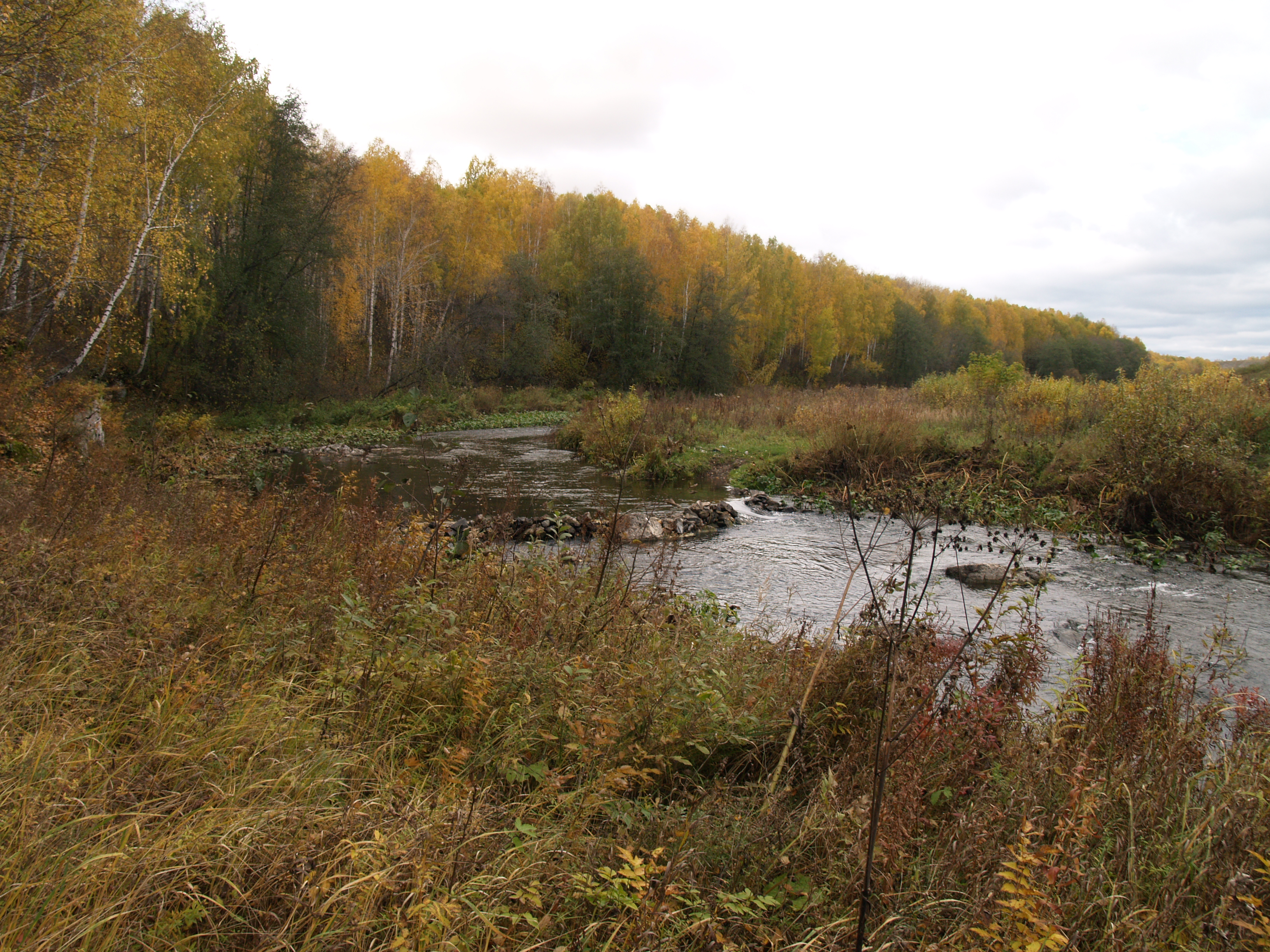 Участок реки Багаряк от базы отдыха "Березка" до устья", Кунашакский район This image is related to the protected area of Russia number 7410177